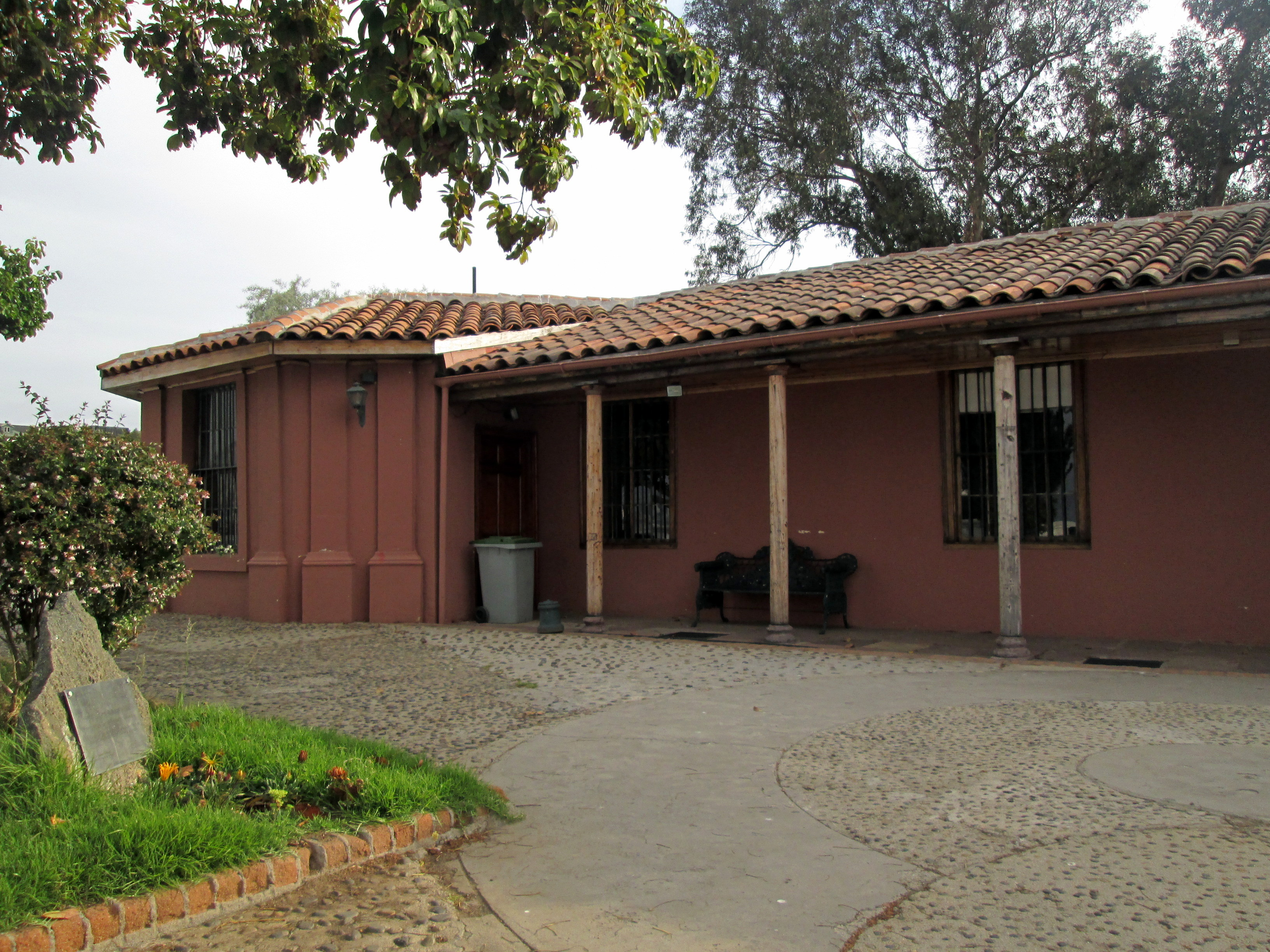 Diferentes imágenes del exterior del Museo Lord Cochrane de Valparaíso.